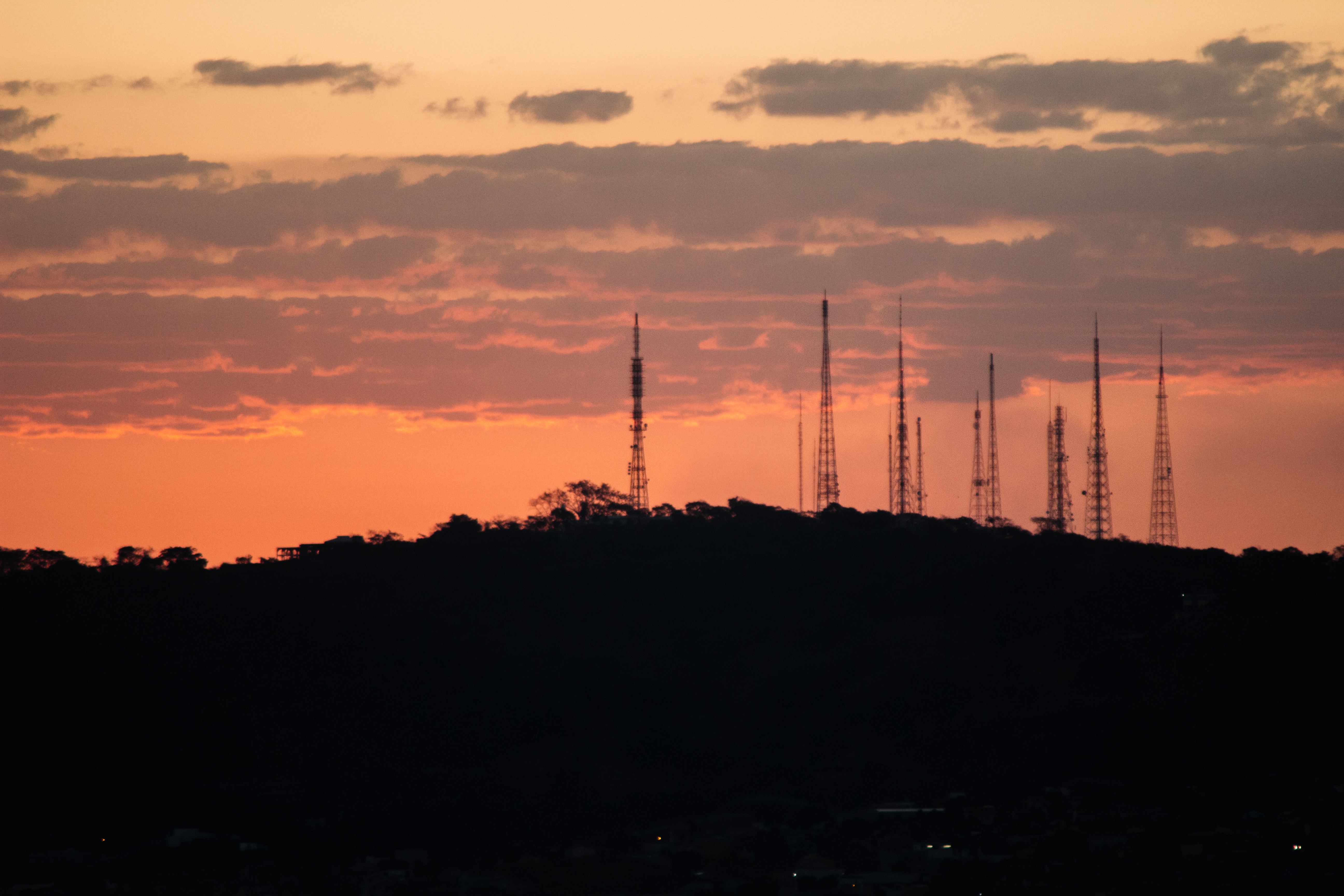 Torres de TV e telefonia no Morro do Mendanha, em Goiânia.